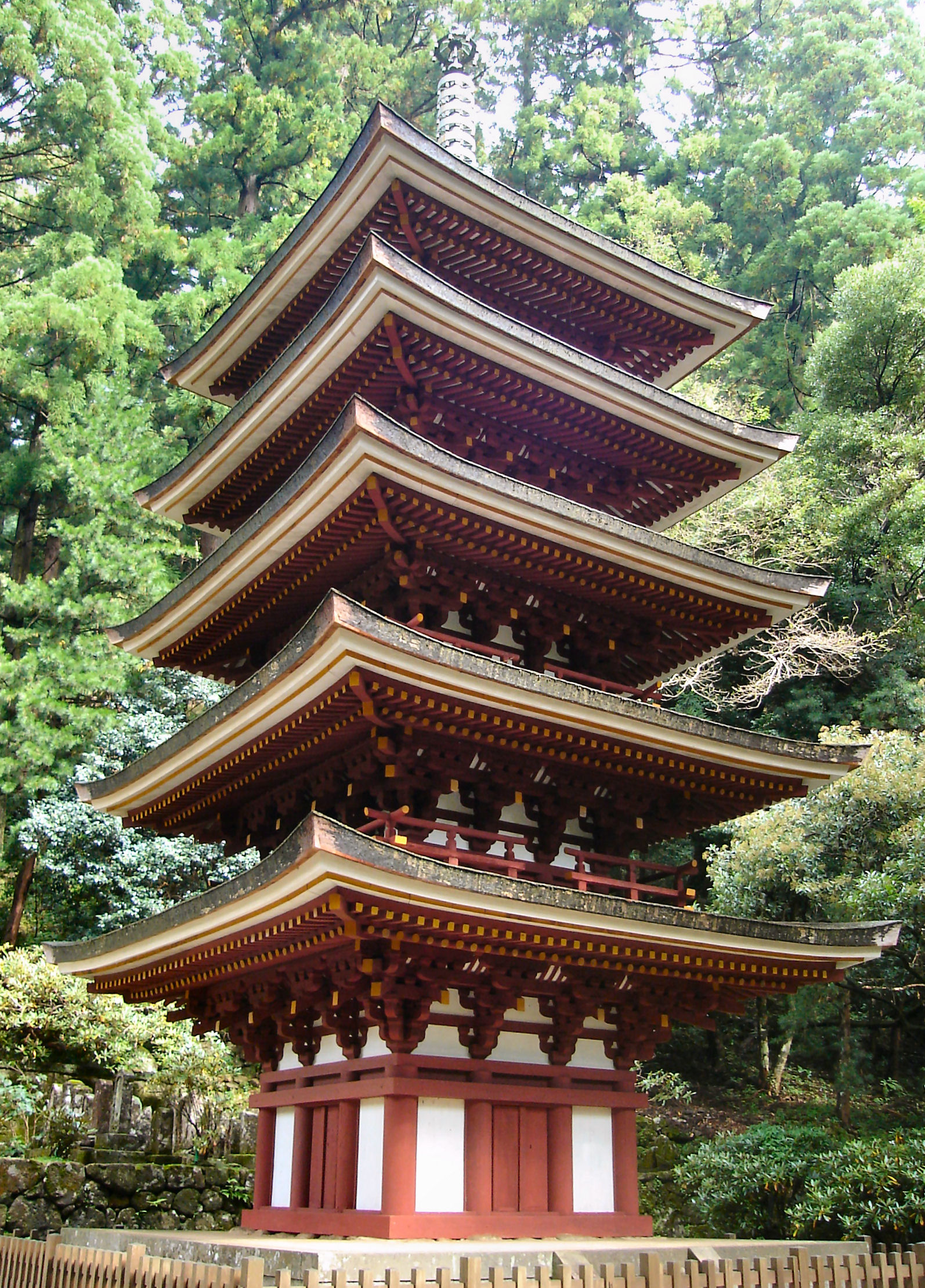 Muroji Gojyu no Tou (Five story Pagoda)